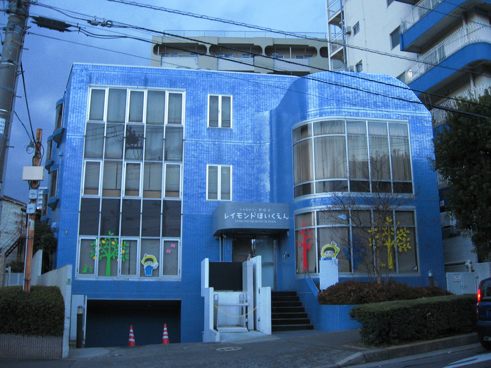 レイモンド田無保育園（東京都田無市、社会福祉法人檸檬会運営）。シンエイ動画の旧本社ビルを利用。